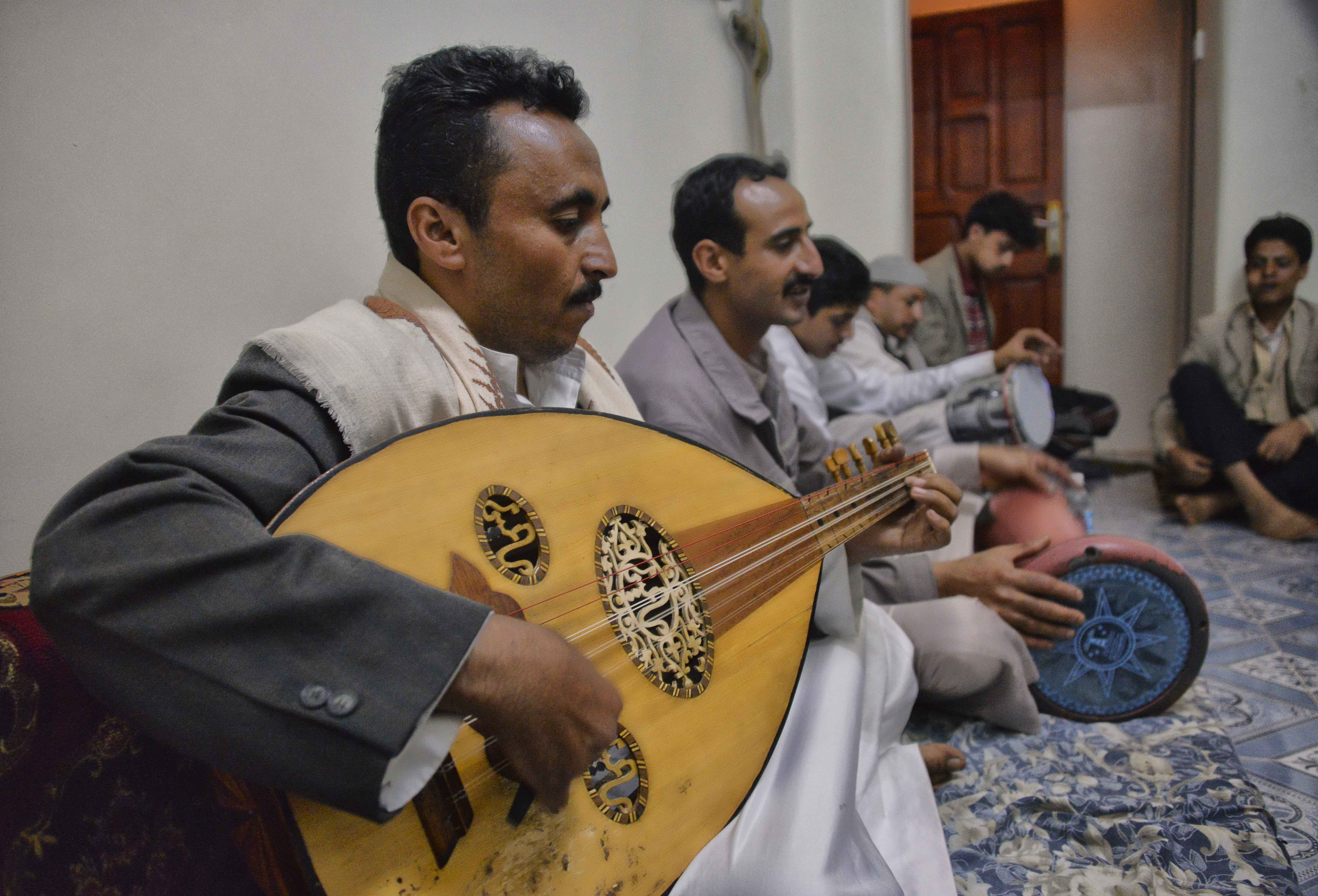 Al-oud, Yemen